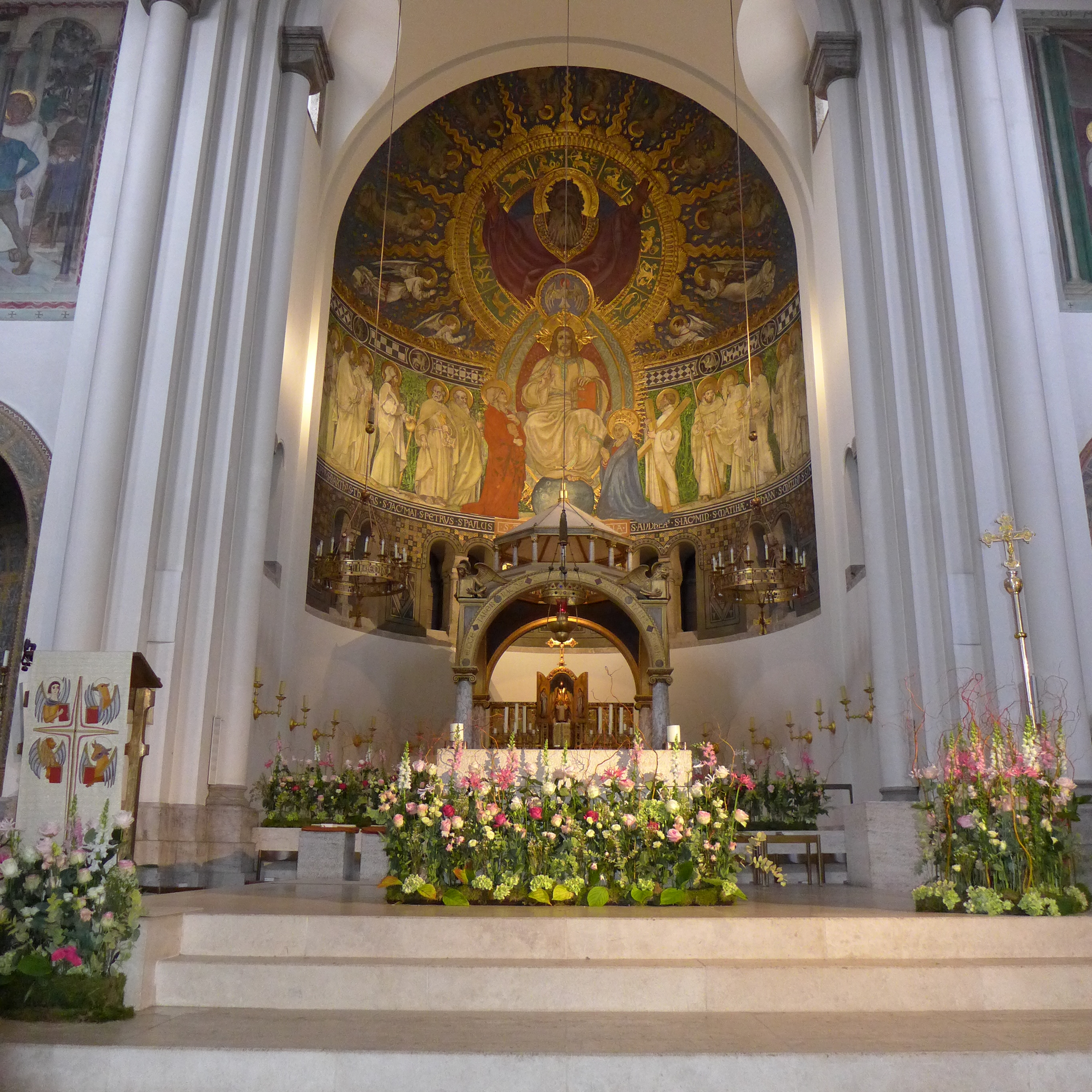 St. Anna im Lehel, Apsis